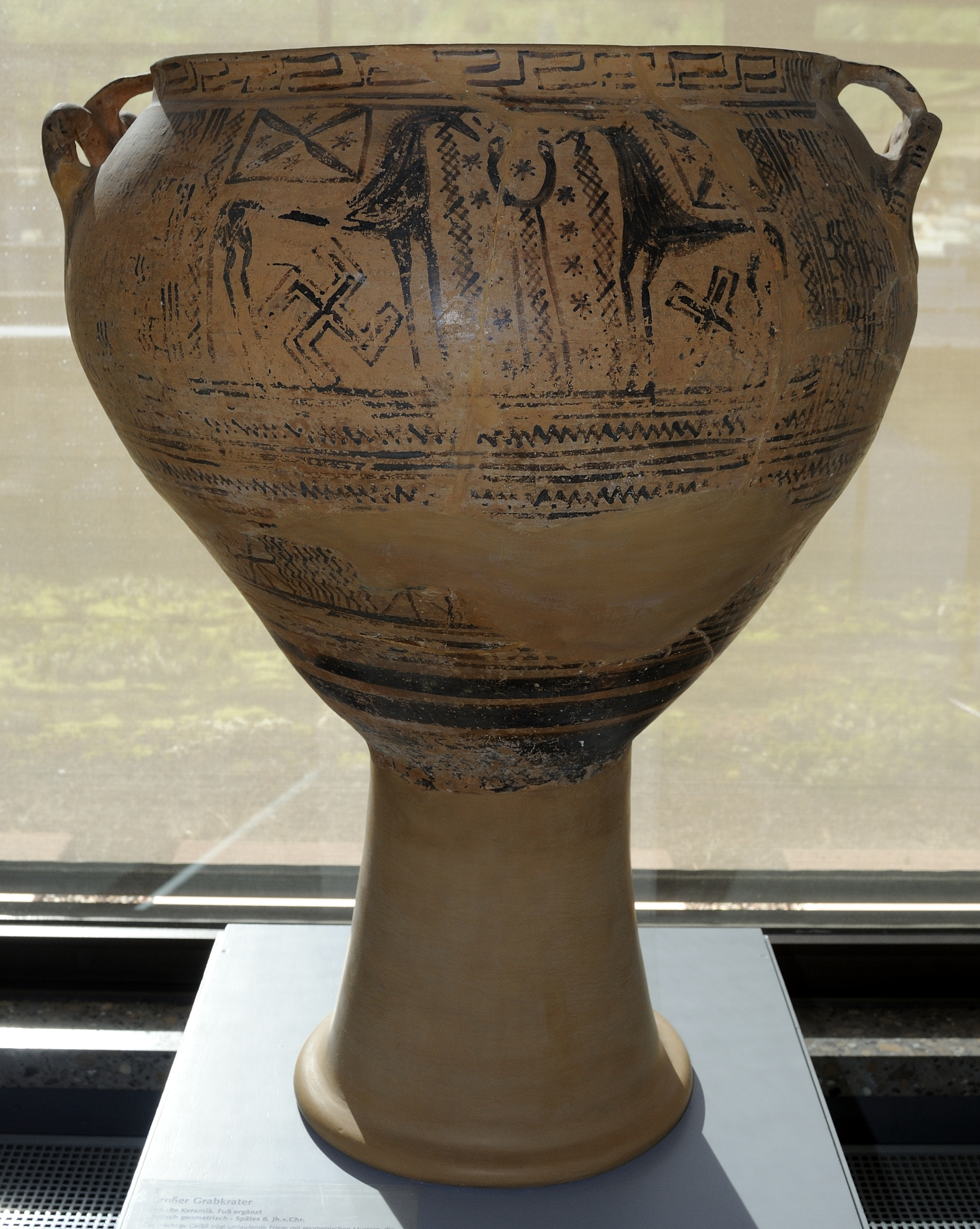 Böotisch-geometrischer großer Grabkrater im Antikenmuseum